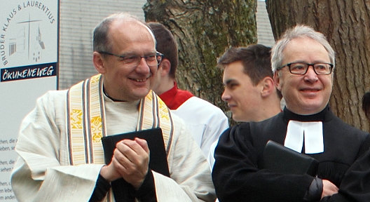 die Dekane von Karlsruhe 2017 Hubert Streckert, katholisches Dekanat Karlsruhe Thomas Schalla, evangelischer Kirchenbezirk Karlsruhe bei der Einweihung des Hagsfelder Ökumeneweges zum Reformationsjubiläum 2017